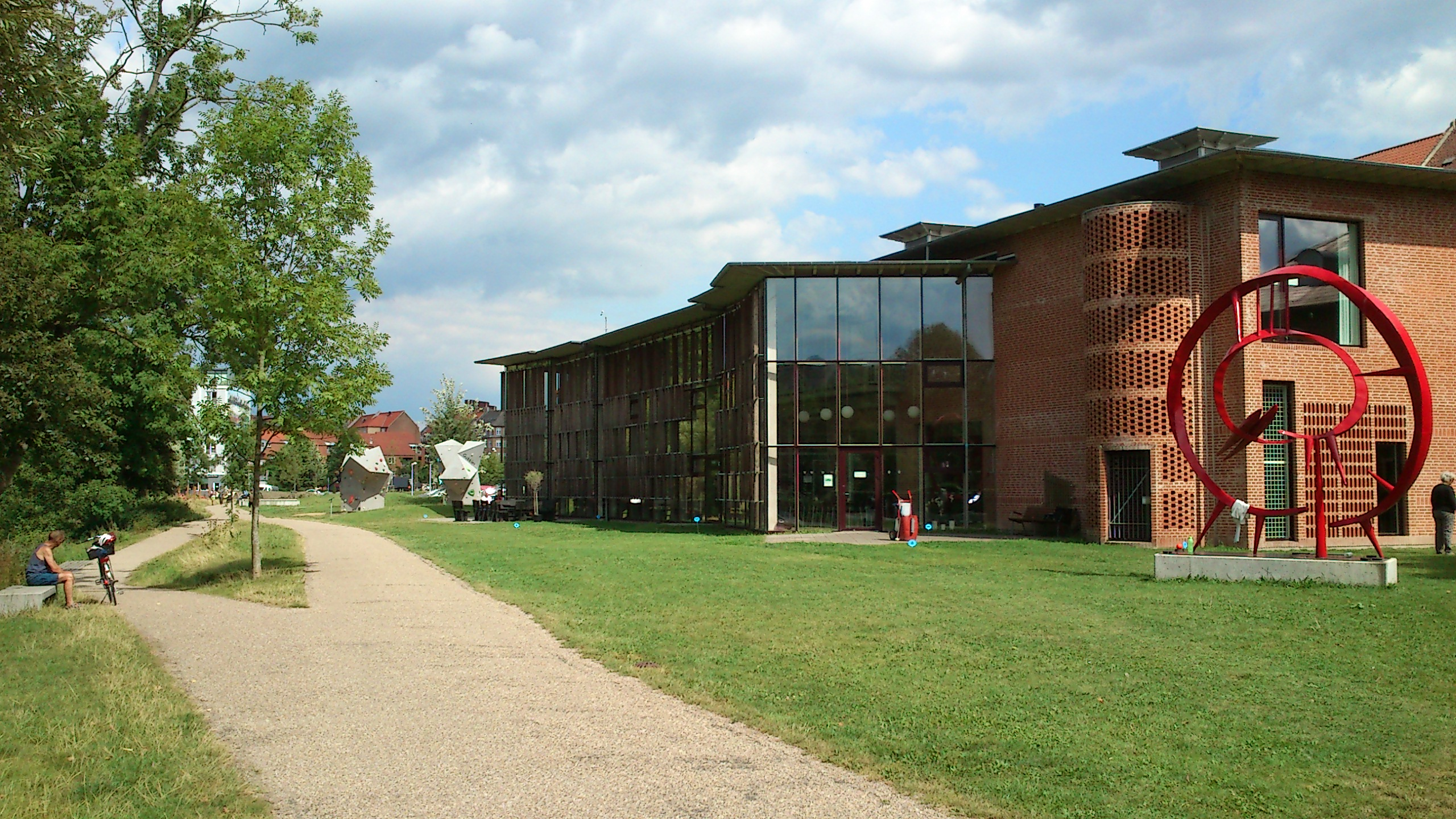 Folkestedet